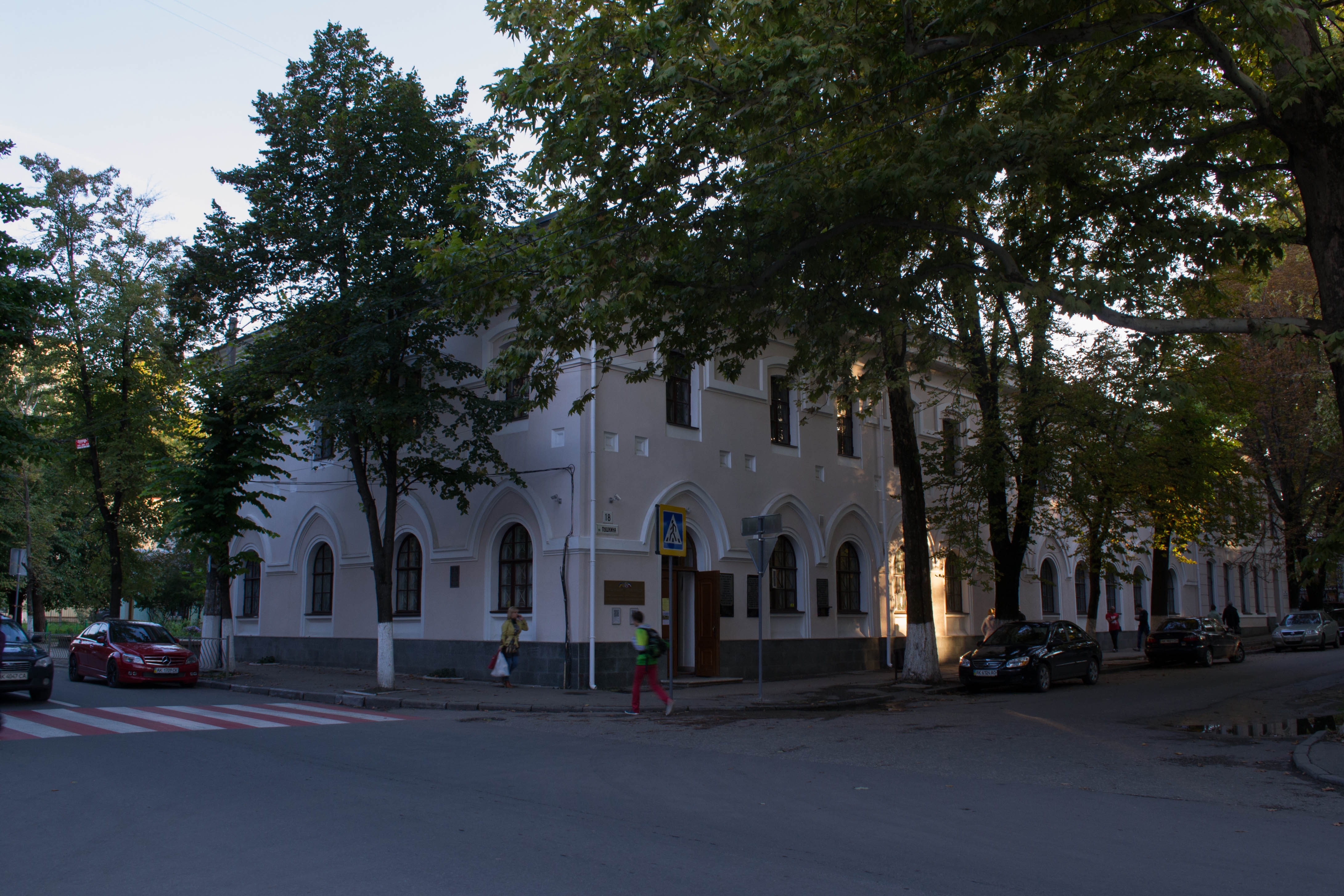 Церква святої Мироносиці Марії Магдалини притулку для дівчаток графині Адлерберг, Сімферополь, вул. Пушкіна, 18/ вул. Гоголя, 12, літер «Б»